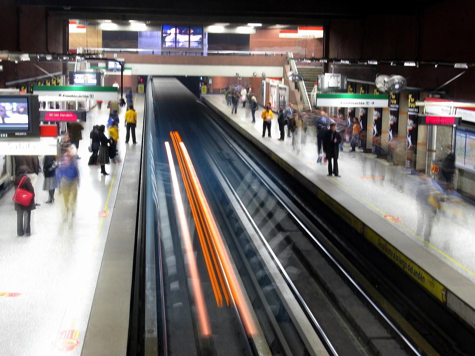 Estación Baquedano, Línea 1 de Metro de Santiago (Chile)